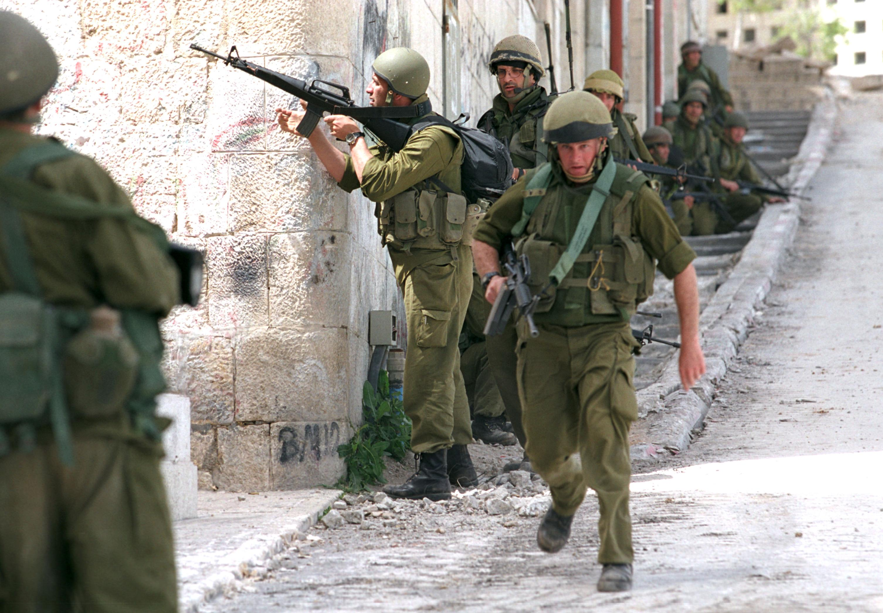 מבצע "חומת מגן" להריסת תשתיות הטרור ברשות הפלשתינית על ידי כוחות צה"ל. בצילום, חיילי צה"ל בפעילות מבצעים ברמאללה.